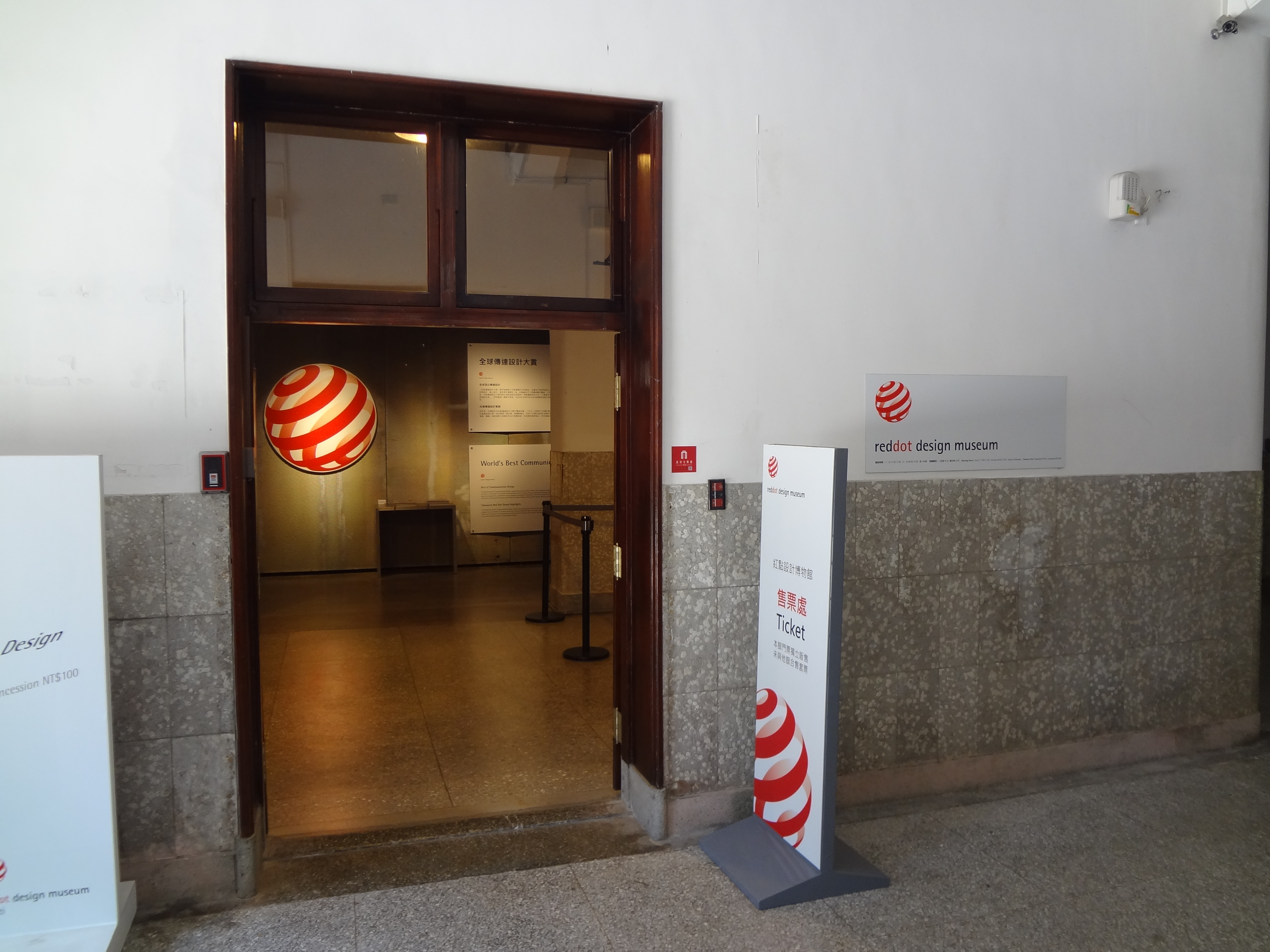 中文（台灣）: 臺北紅點設計博物館，位於臺灣臺北市松山文化創意園區1樓。